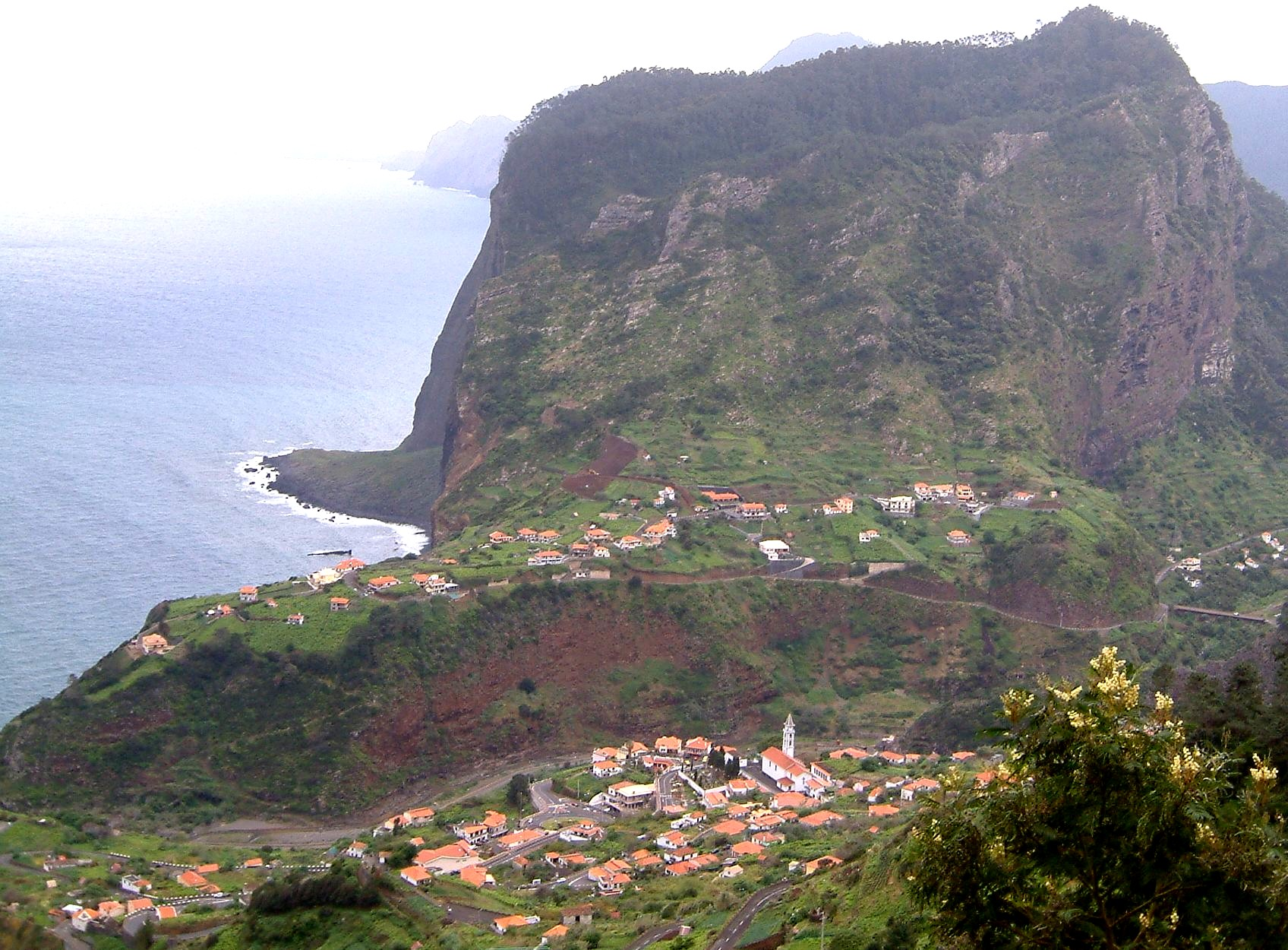 Madeira_adlerfelsen_Faial_Nordostküste_5-07. Photograph: Peggy